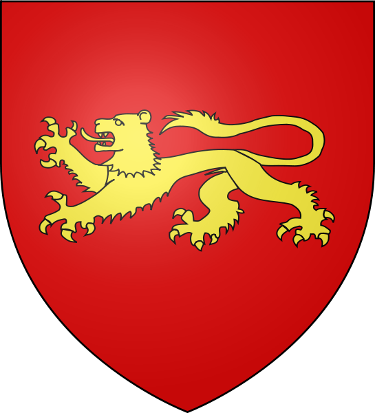 blason des vicomtes de Cralat au XIIe siècle.